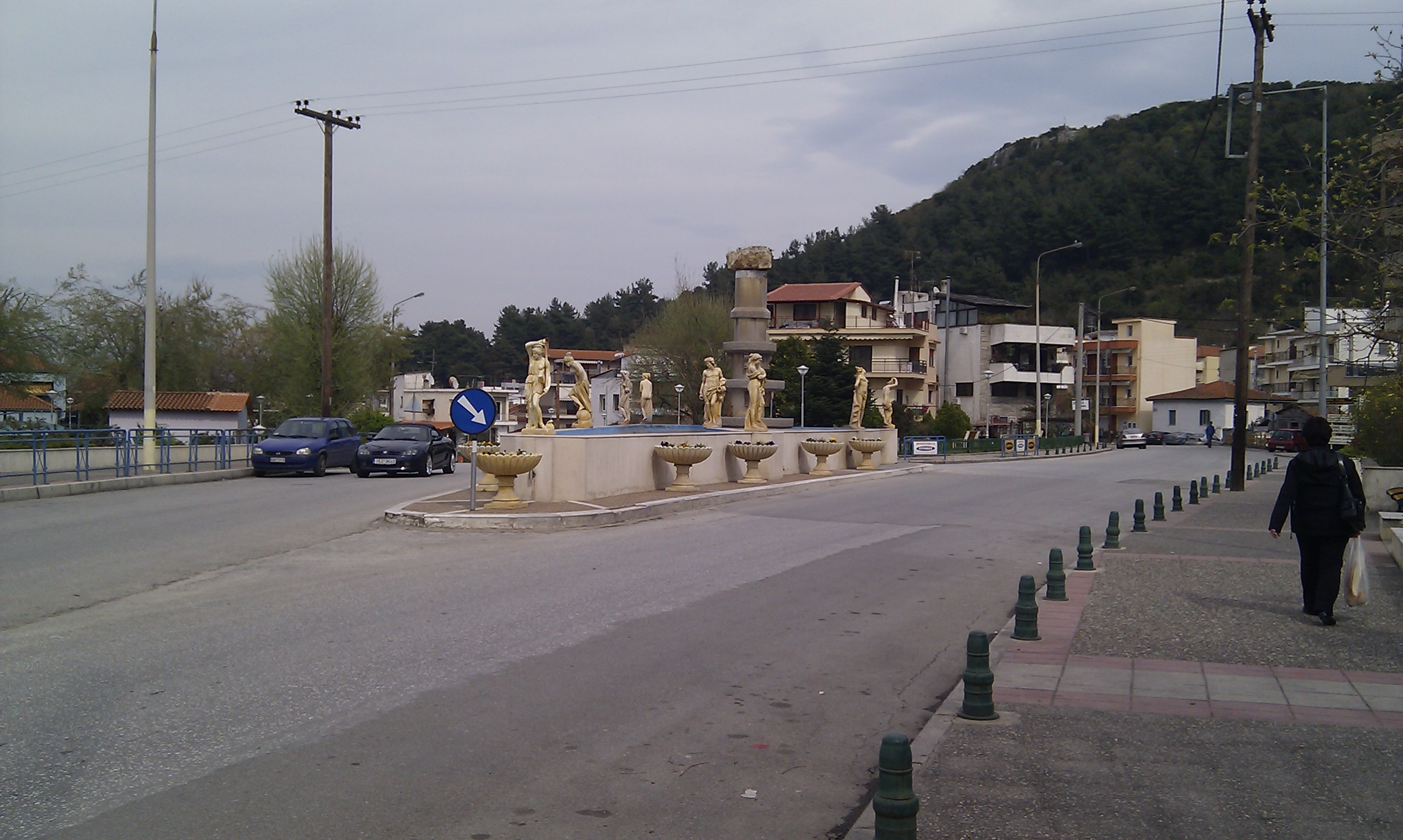 Συντριβάνι σε πλατεία της Ελευθερούπολης Καβάλας.